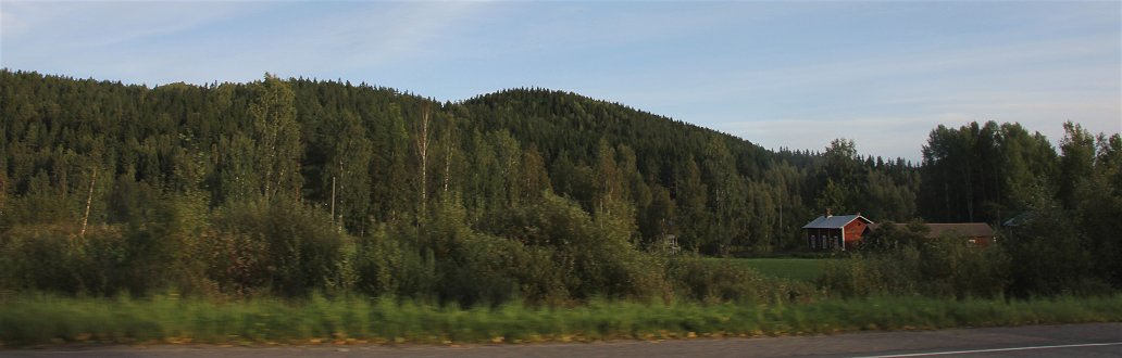 Vanuvuori on mäki ja kaupunginosa Kuopion eteläosassa noin 13 kilometriä keskustasta etelään. Mäen korkeus on 212 metriä joten se on Kuopion neljänneksi korkein mäki. Vanuvuori kohoaa Kallaveden pinnasta 130 metriä, ja se sijaitsee Hiltulanlahden rannalla. Kuopion 39. kaupunginosana Vanuvuori sijaitsee Hiltulanlahden kaupunginosan itäpuolella ja Pirtin kaupunginosan eteläpuolella. Se on veden rajaama kolmesta ilmansuunnasta: iässä se rajoittuu Kallaveden Mustalahteen, pohjoisessa Koiraveteen ja lännessä (Koiraveden) Hiltulanlahteen.